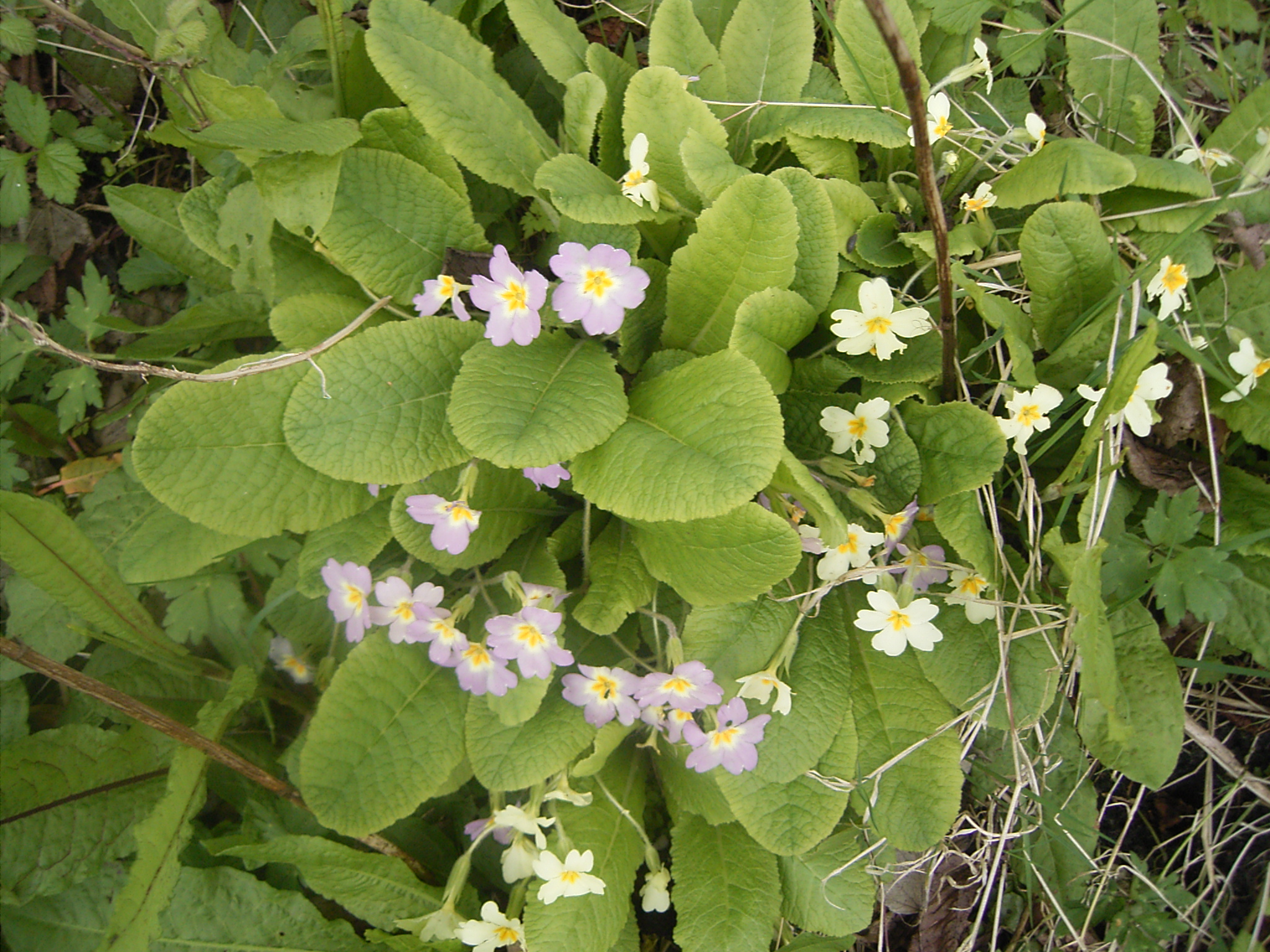 Deze foto toont een stengelloze sleutelbloem met zachtroze bloemen. Primula vulgaris, with soft lila flowers.